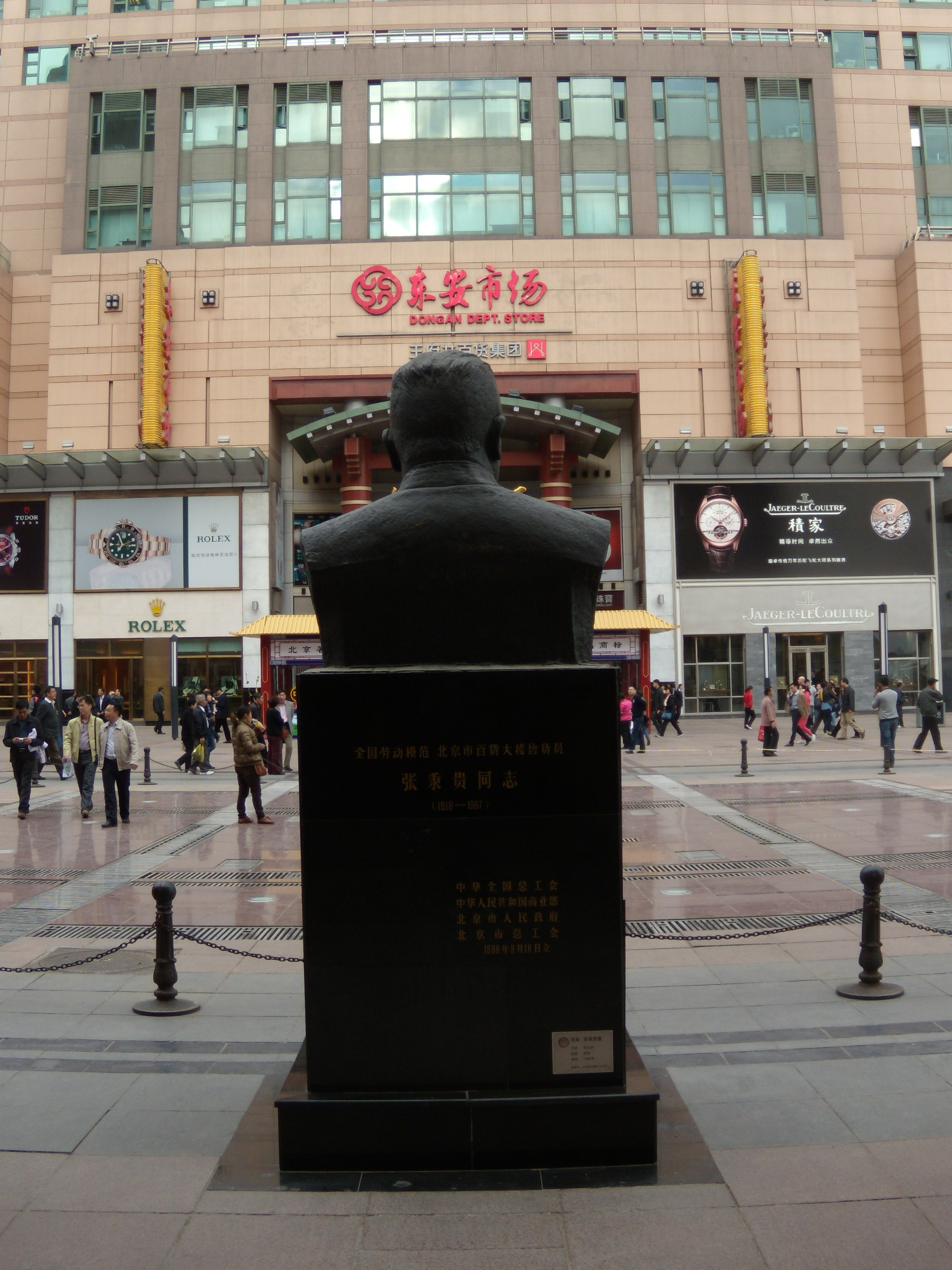 王府井百货大楼前的张秉贵像，位于王府井大街